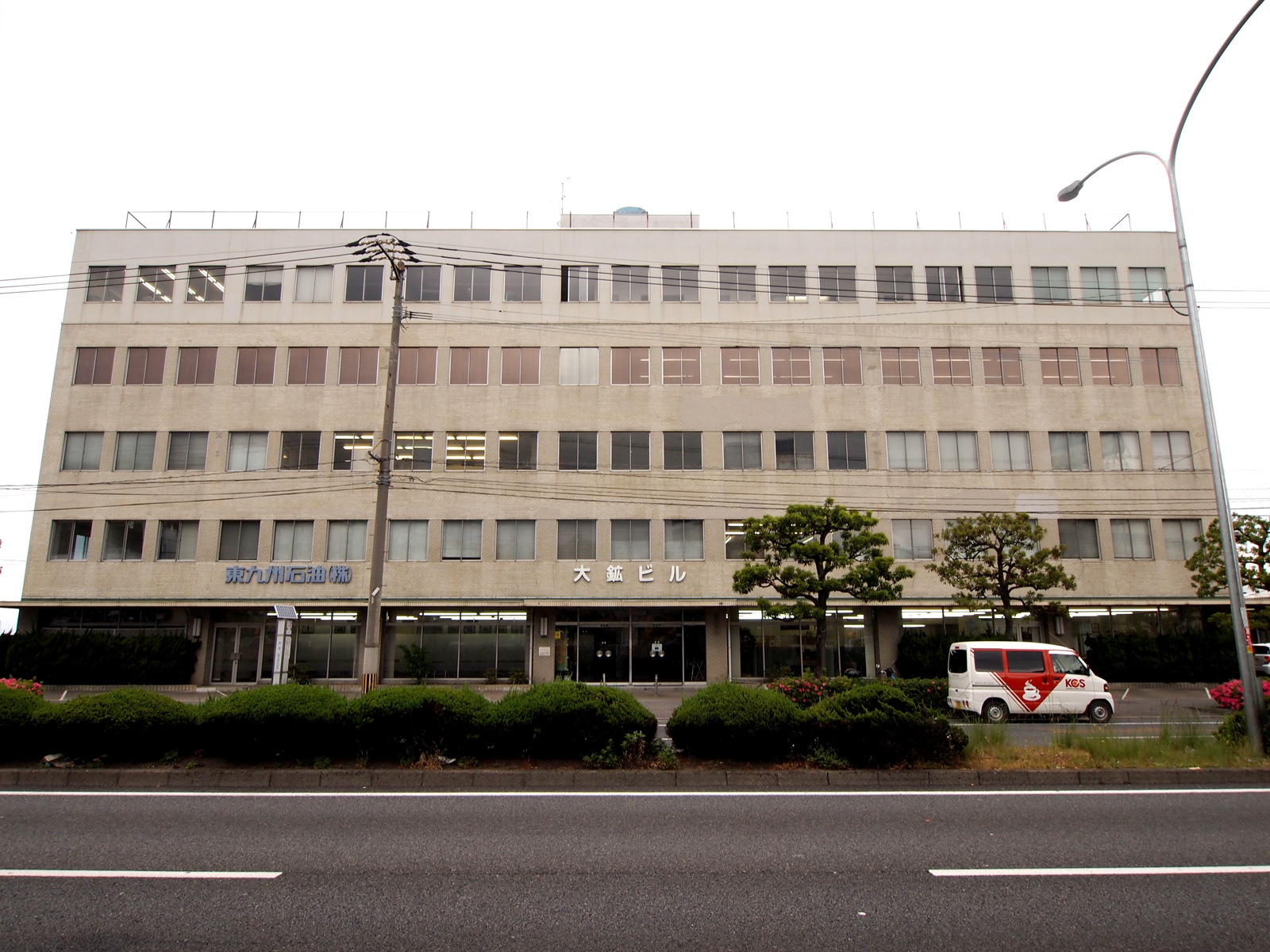 東九州石油本社（大分県大分市大鉱ビル）